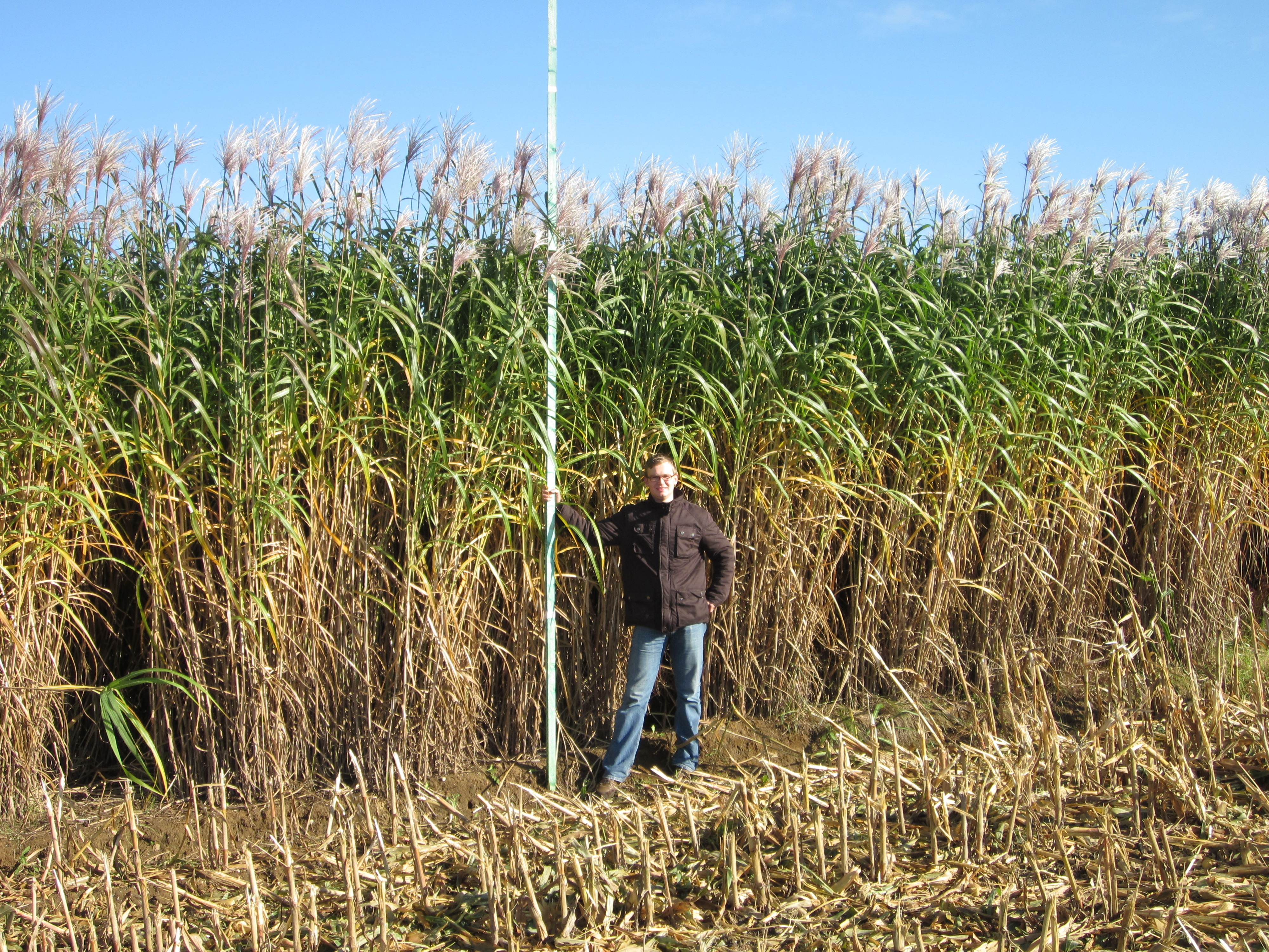 Miscanthus x Gigantheus auf einem Feld bei Firma Sieverdingbeck in NRW